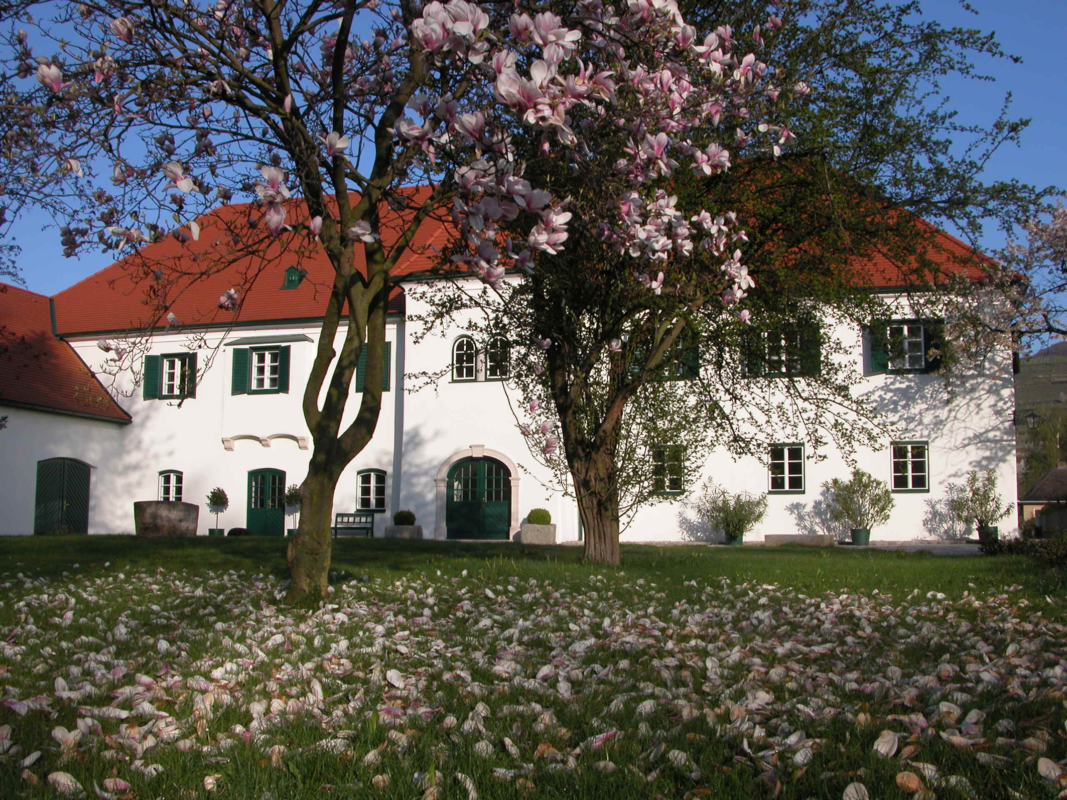 Ansicht des Weingutes Prager